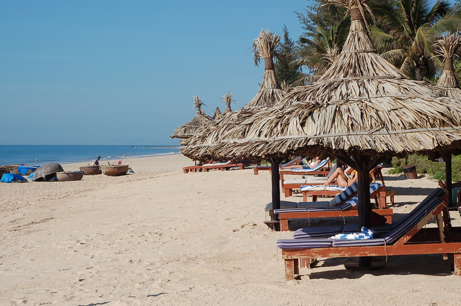 Mũi Né beach, Phan Thiết, Vietnam.